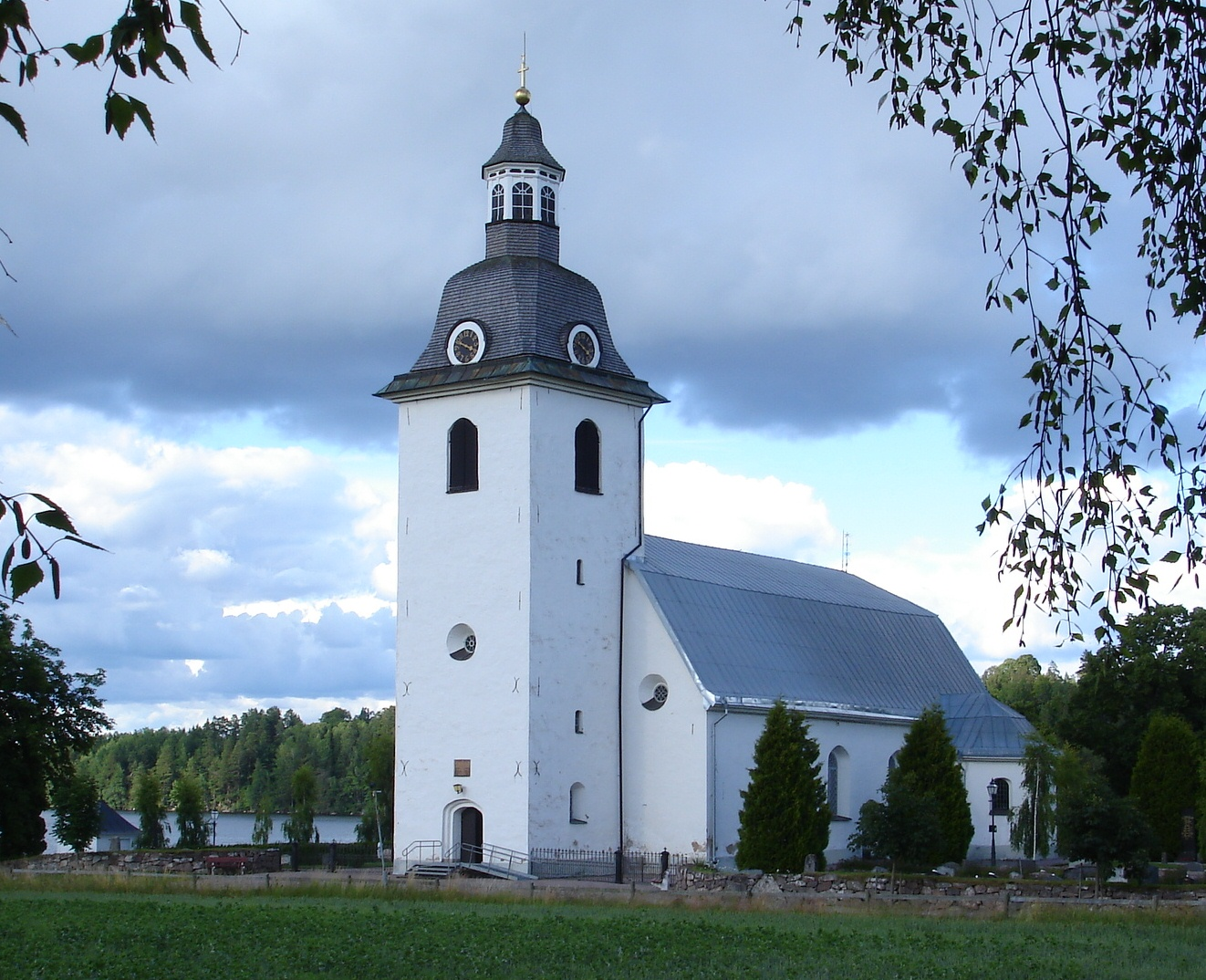 Norra Vi kyrka i Ydre kommun i Östergötland